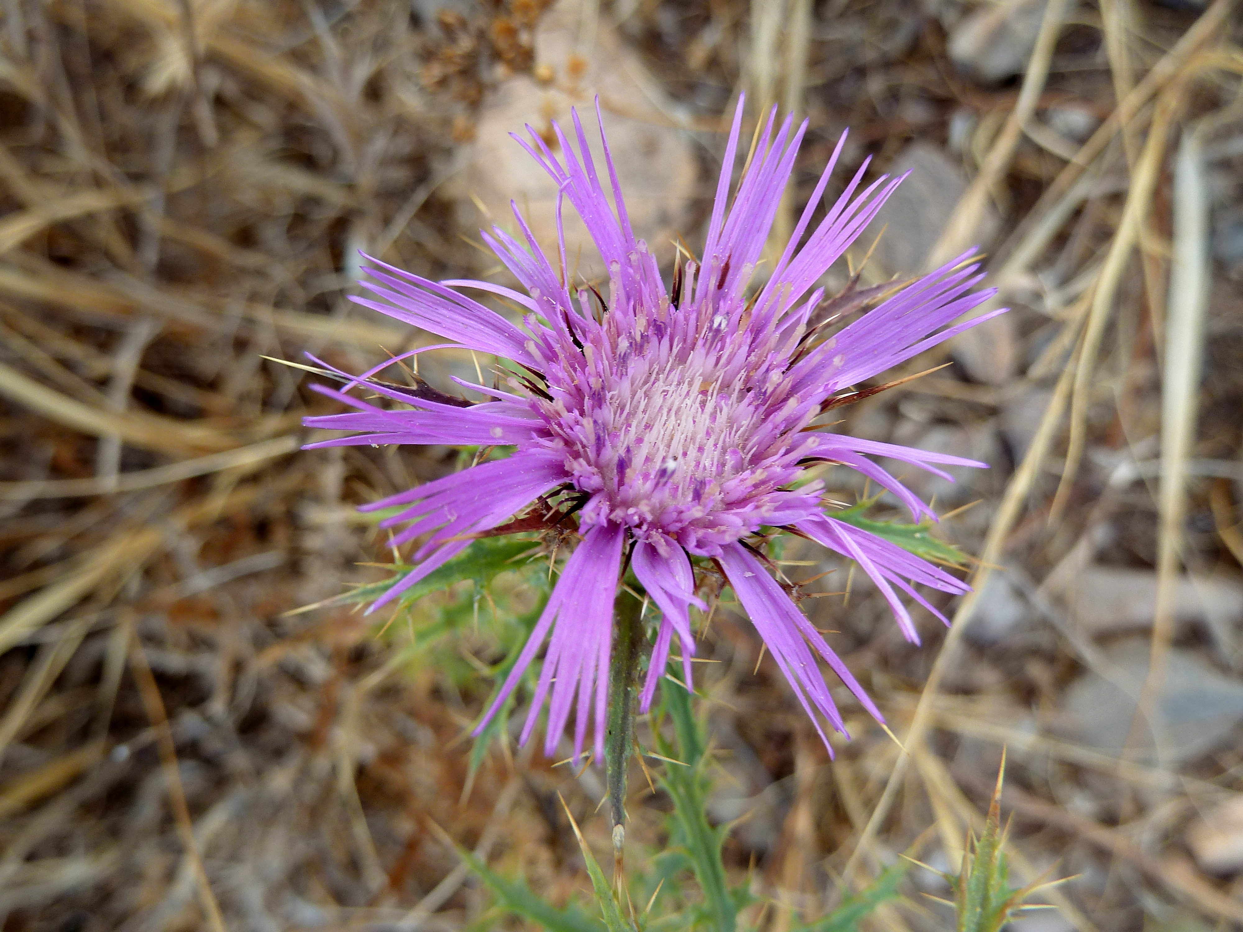 Atractylis humilis - Capitulo en antesis; vista cenital. - circa Punto Limpio al Este del Polígono 'El Labradorcico', Águilas (Provincia de Murcia, España).